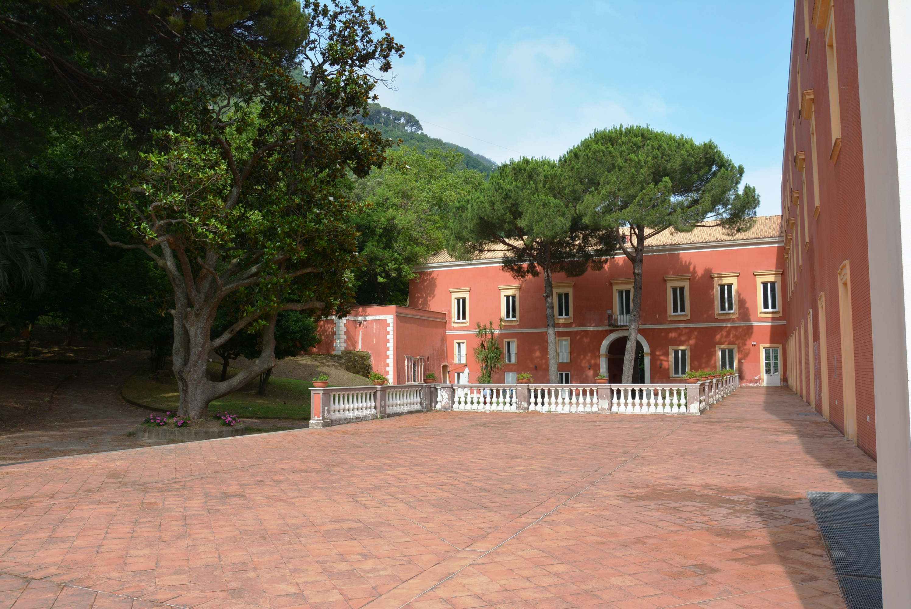 Reggia di Quisisana a Castellammare di Stabia